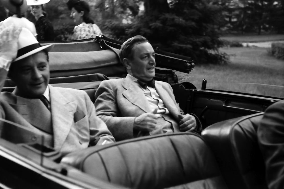 Schloss Güterfelde, Truppenbetreuung: Carl Jöken und Hans Moser im Auto